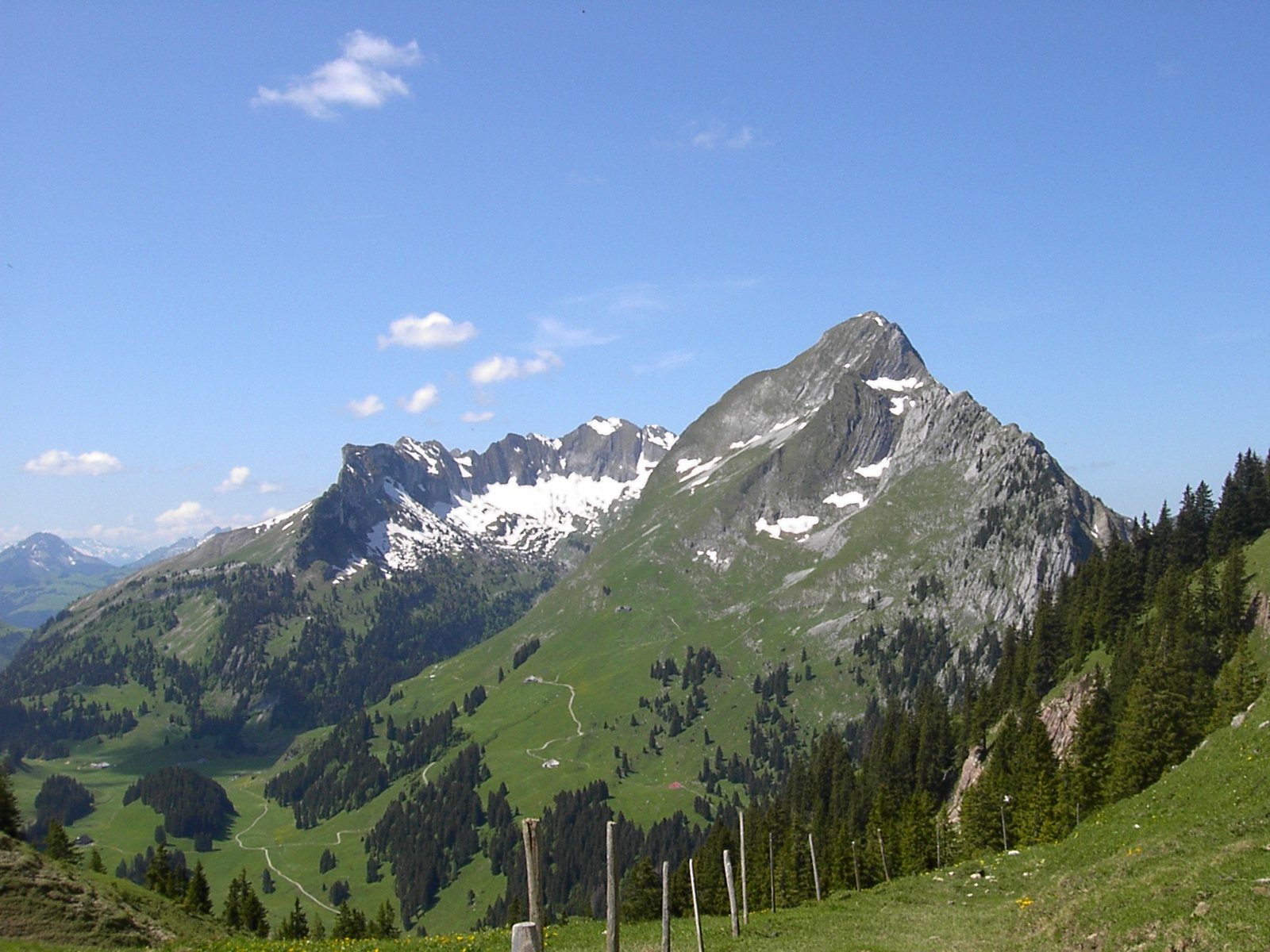 Die höchsten Erhebungen der Freiburger Alpen: Im Vordergrund der Dent de Brenleire (2358 m), im Hintergrund in der Mitte der Vanil Noir (2389 m).